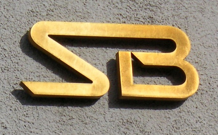 Skylt "Svenska Bostäder" vid Dalen i Stockholm